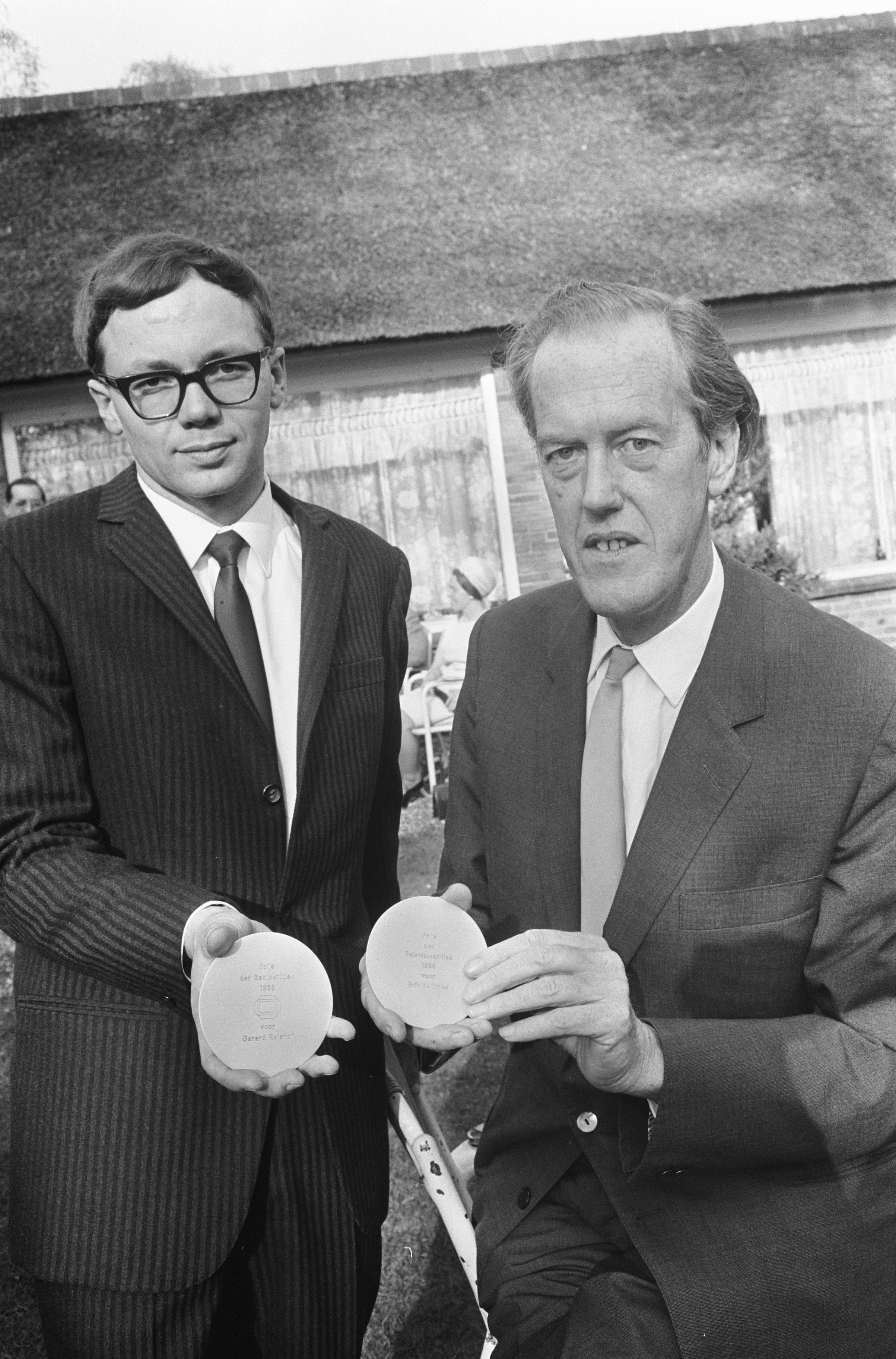 Collectie / Archief : Fotocollectie Anefo Reportage / Serie : [ onbekend ] Beschrijving : Uitreiking Nipkow-schijven aan Gerard Hulshof (links) en Erik de Vries Datum : 2 mei 1966 Persoonsnaam : Hulshof, Gerard, Vries, Erik de Fotograaf : Koch, Eric / Anefo Auteursrechthebbende : Nationaal Archief Materiaalsoort : Negatief (zwart/wit) Nummer archiefinventaris : bekijk toegang 2.24.01.05 Bestanddeelnummer : 919-1058